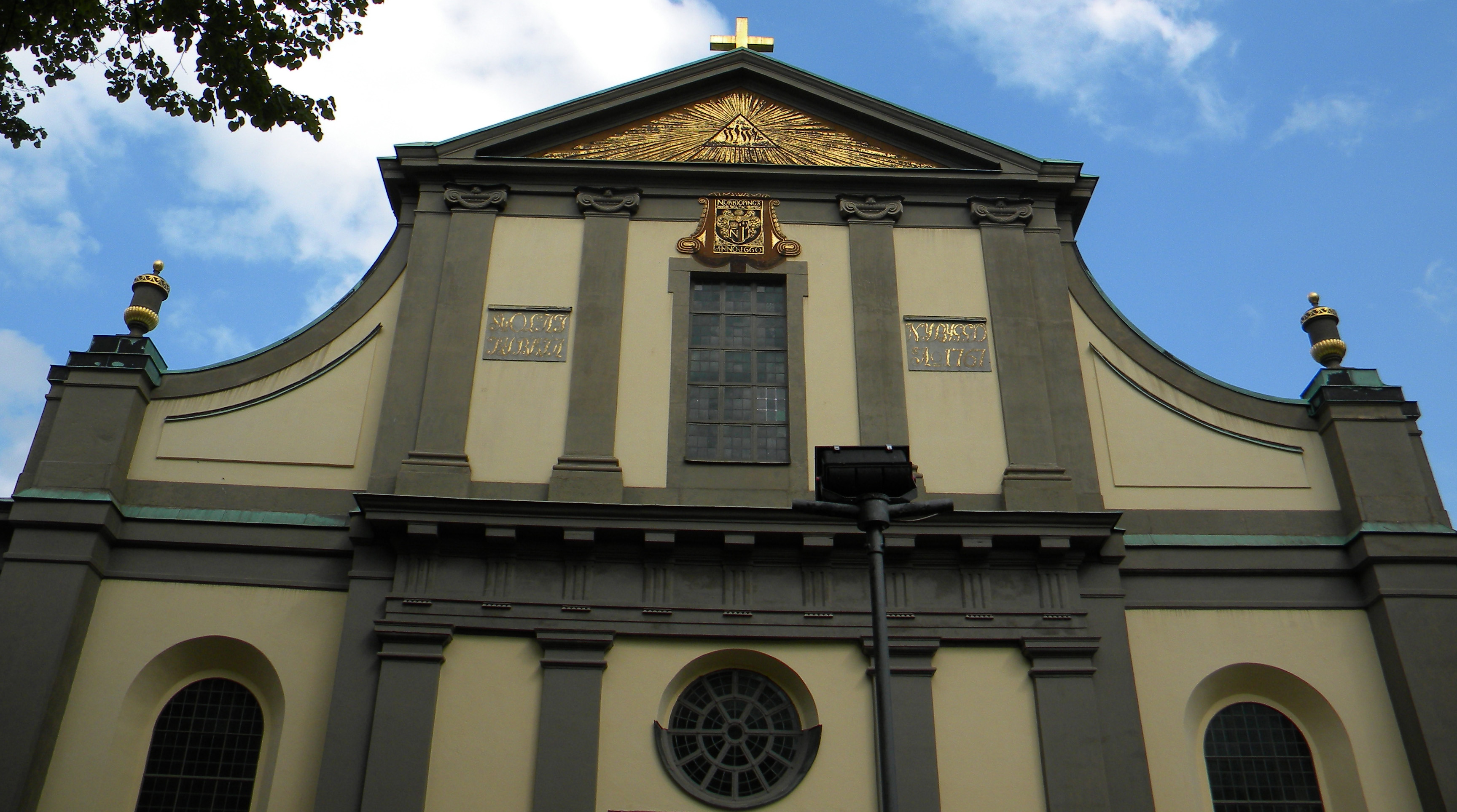 Sankt Olai kyrka i Norrköping med tetragrammet JHWH högst upp i triangeln